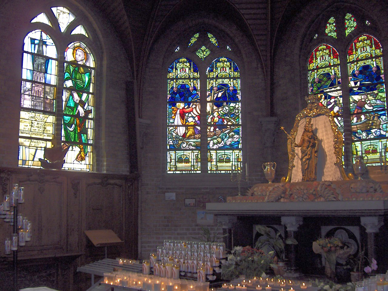 Onze-Lieve-Vrouw-ter-Zee (17the cent.), patron of the fishermen; Onze-Lieve-vrouw-ter-Duinenkerk; Ostend, Belgium